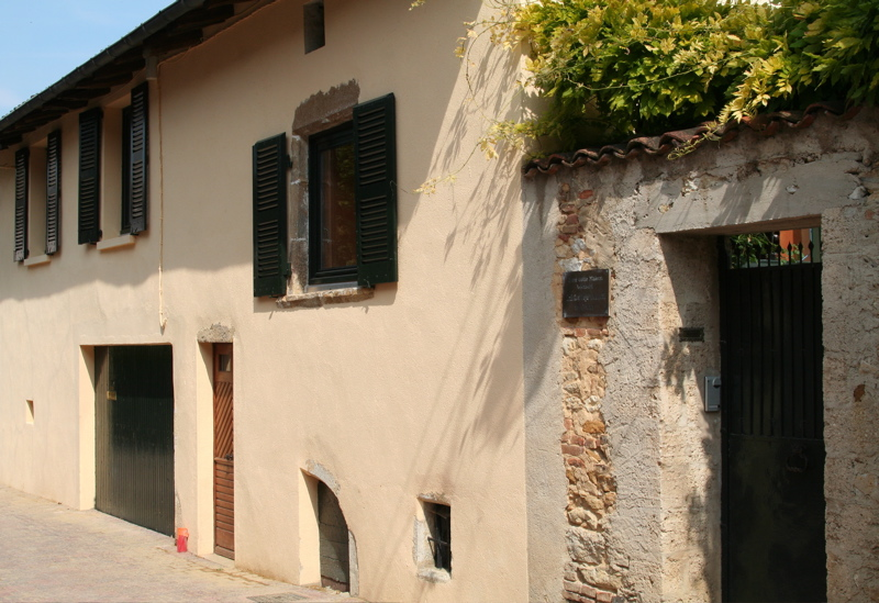 Vue du centre de Meillonnas (Ain)